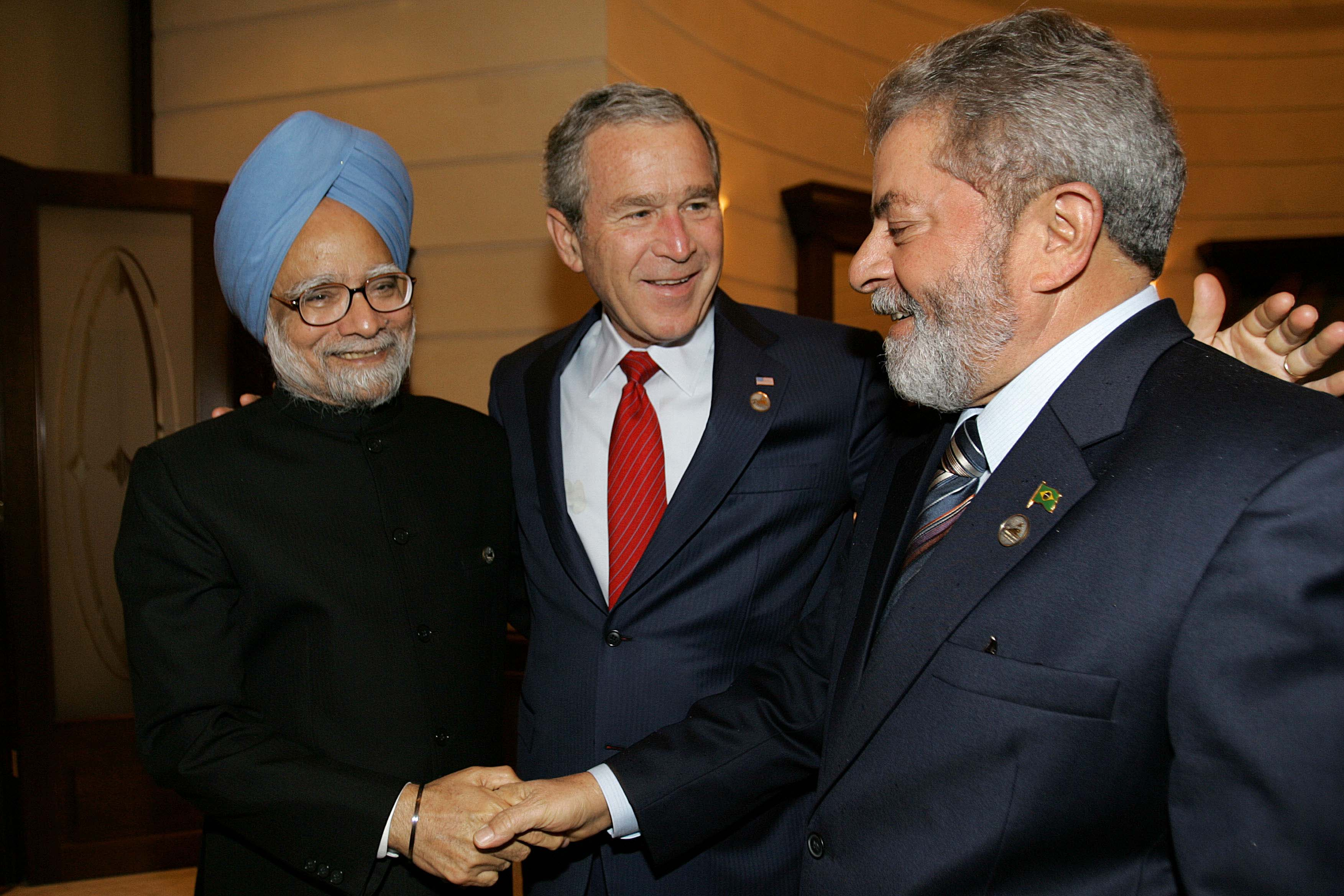 São Petersburgo, Rússia - 17 de julho de 2006. Presidente Lula cumprimenta o primeiro - ministro da Índia, Manmohan Singh, observado pelo presidente dos Estados Unidos, George W. Bush.